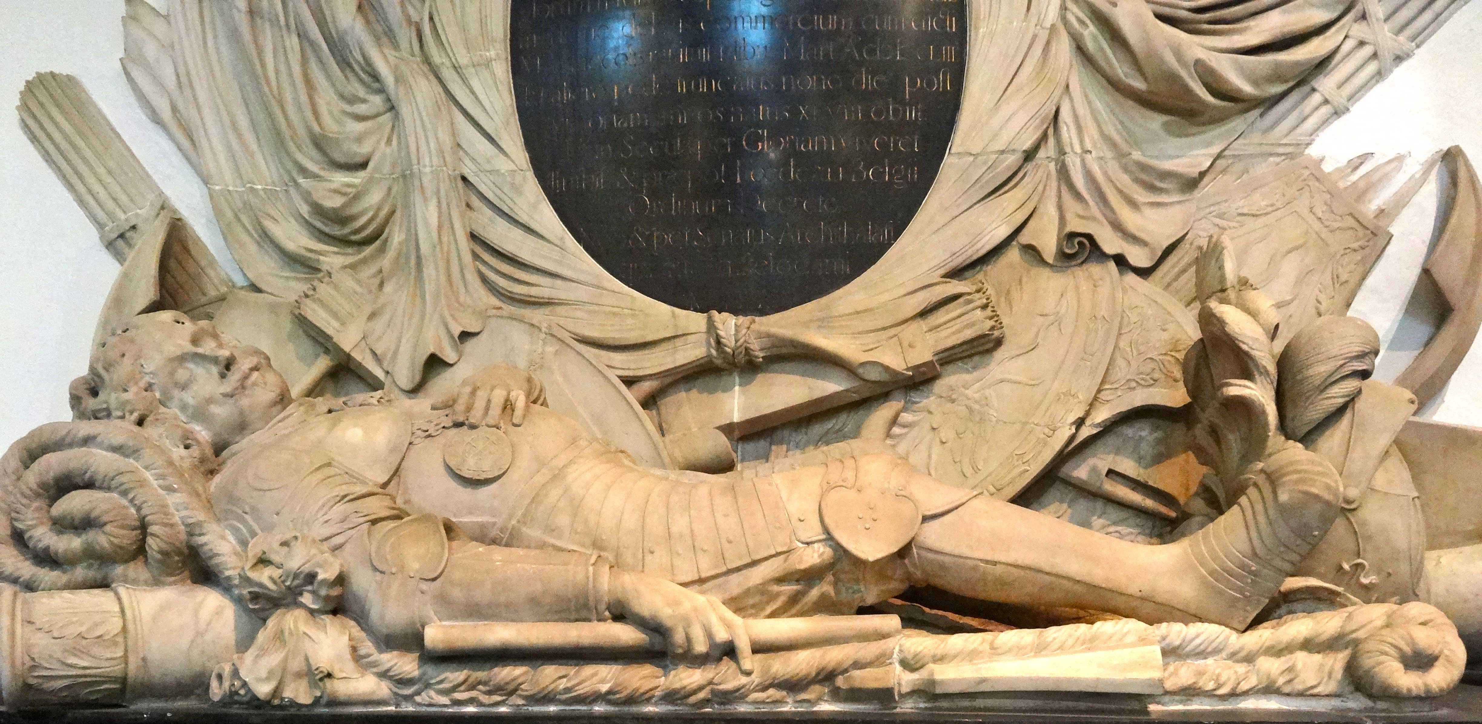 Nieuwe Kerk Amsterdam (grafmonument van Jan van Galen)